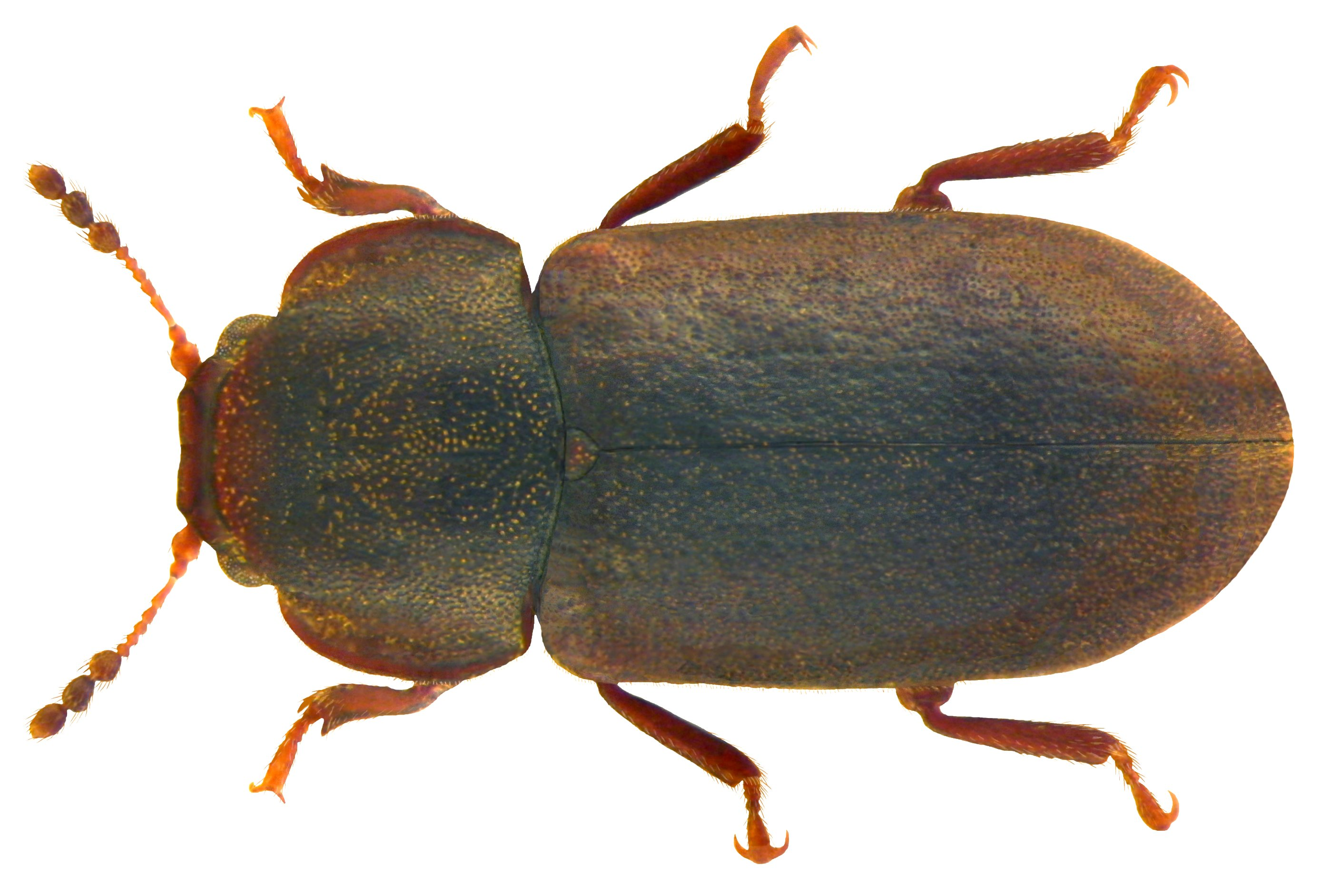 Familie: Cisidae (Syn.: Ciidae) Groesse: 2,8-4 mm Verbreitung: Europa Ökologie: in Baumschwämmen Fundort: Germania, Bayern, Oberfranken, Kulmbach leg. det. U.Schmidt, 1975 Photo: U.Schmidt, 2010